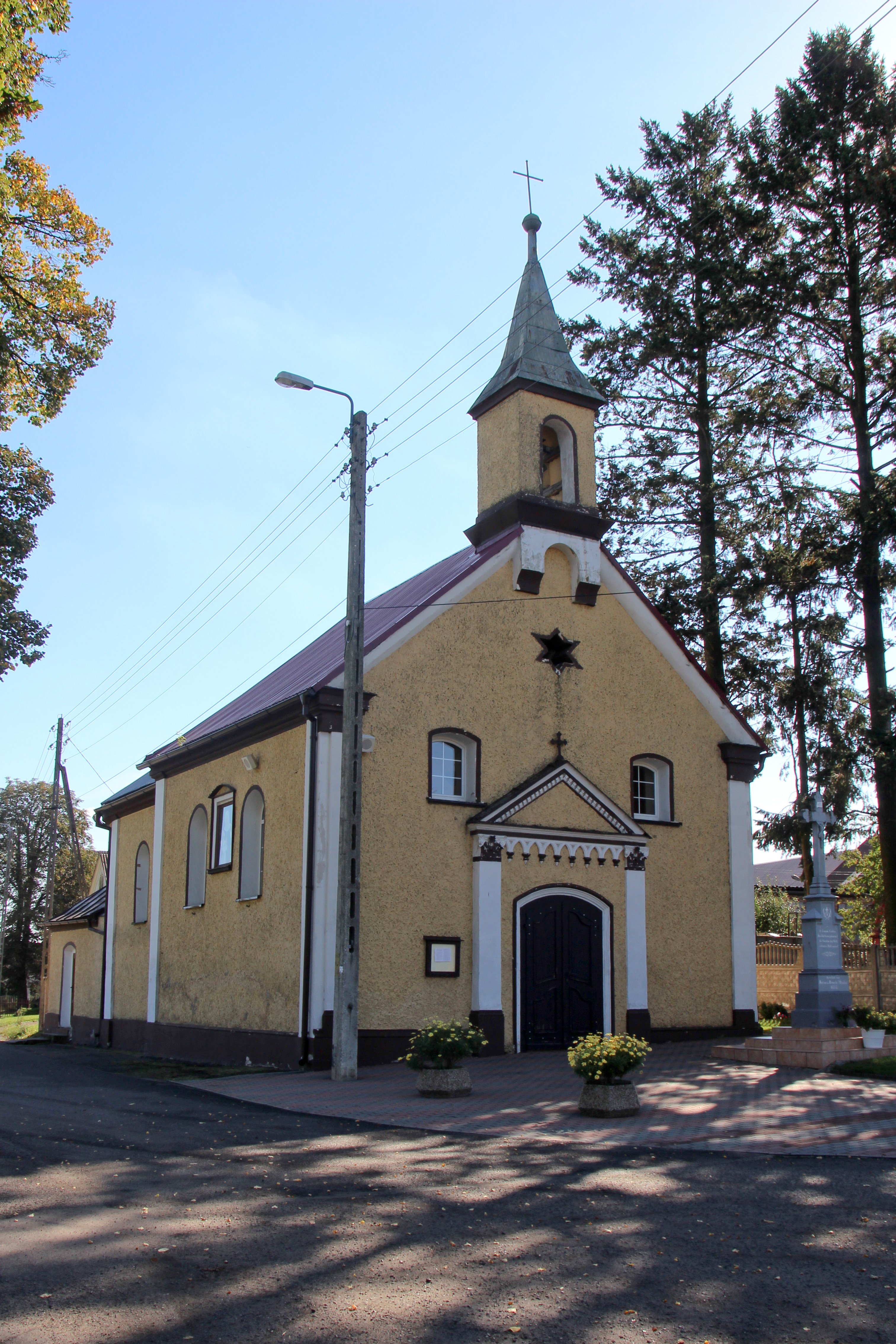 Kozłówki - wieś w Polsce położona w województwie opolskim, w powiecie głubczyckim, w gminie Kietrz.